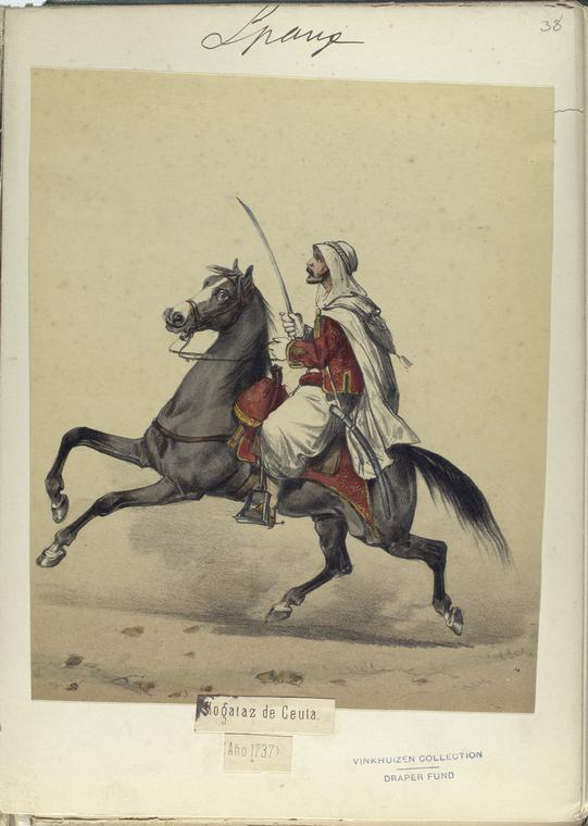 Mogataz de Ceuta (año 1737)